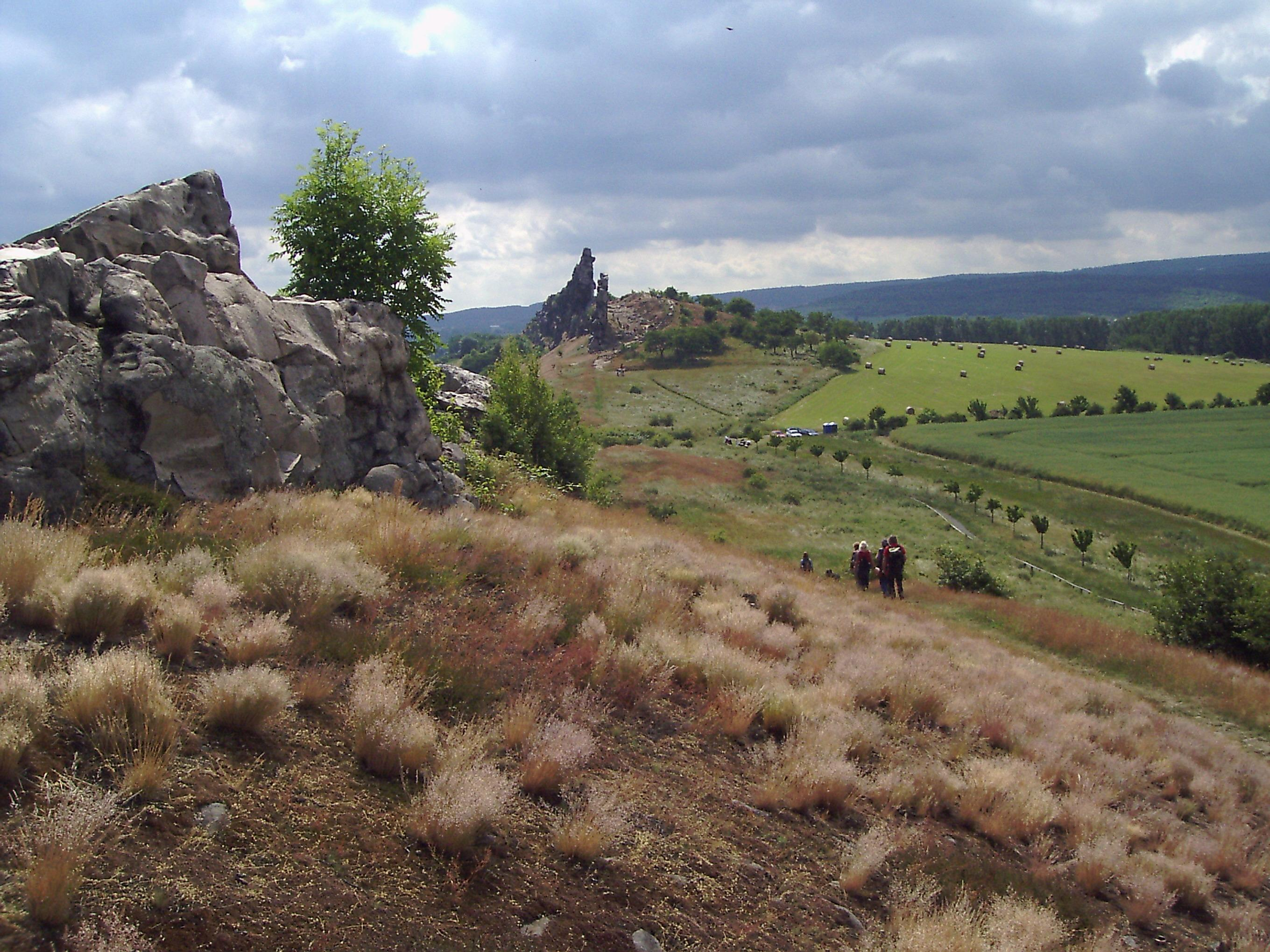 Silbergrasrasen am Mittelstein (Teufelsmauer bei Weddersleben). Mit Blick auf den Königstein und die Nordharzkante.